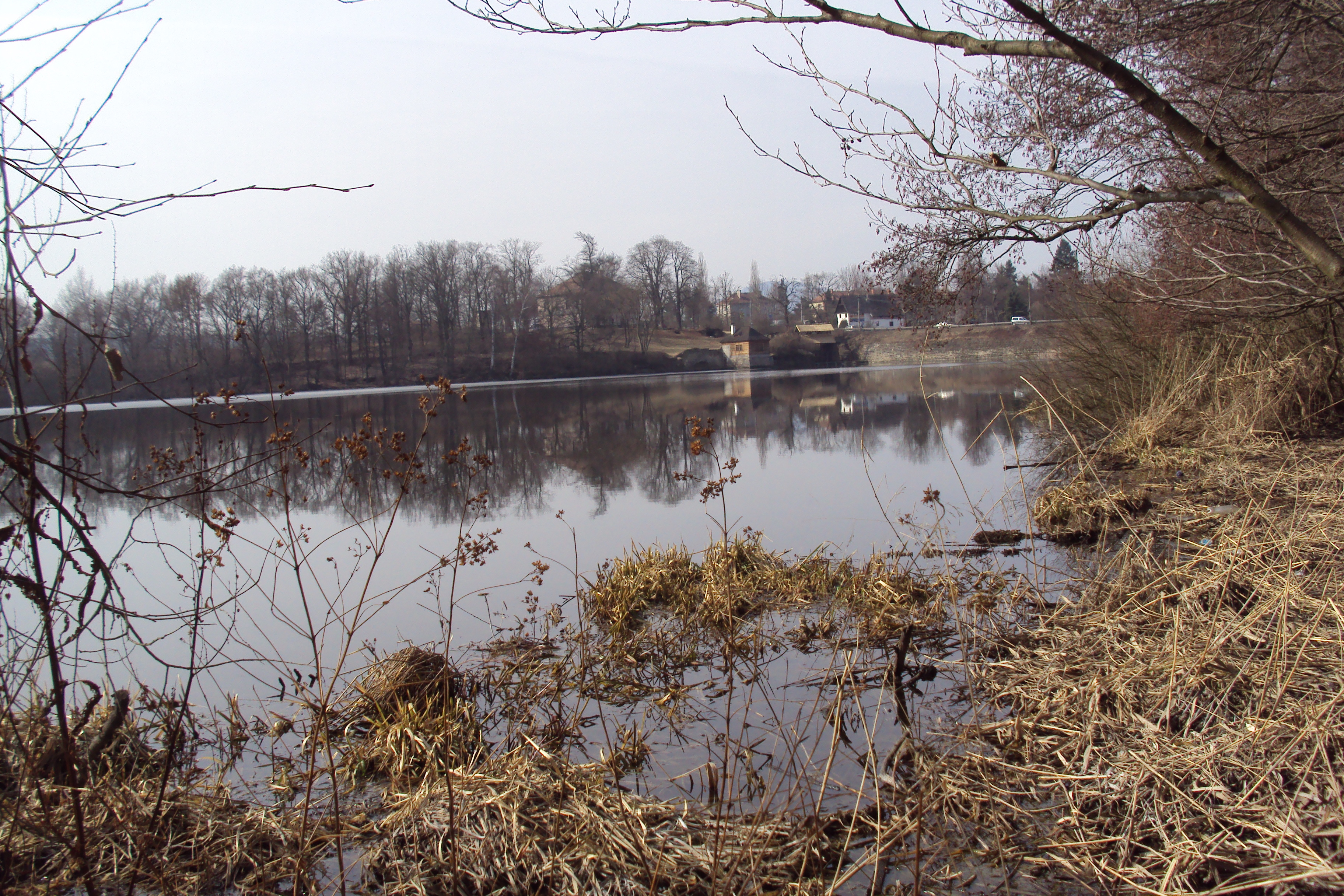 Rezervace je u obce Zahrádky na Českolipsku, na katastru vzdálené obce Jestřebí